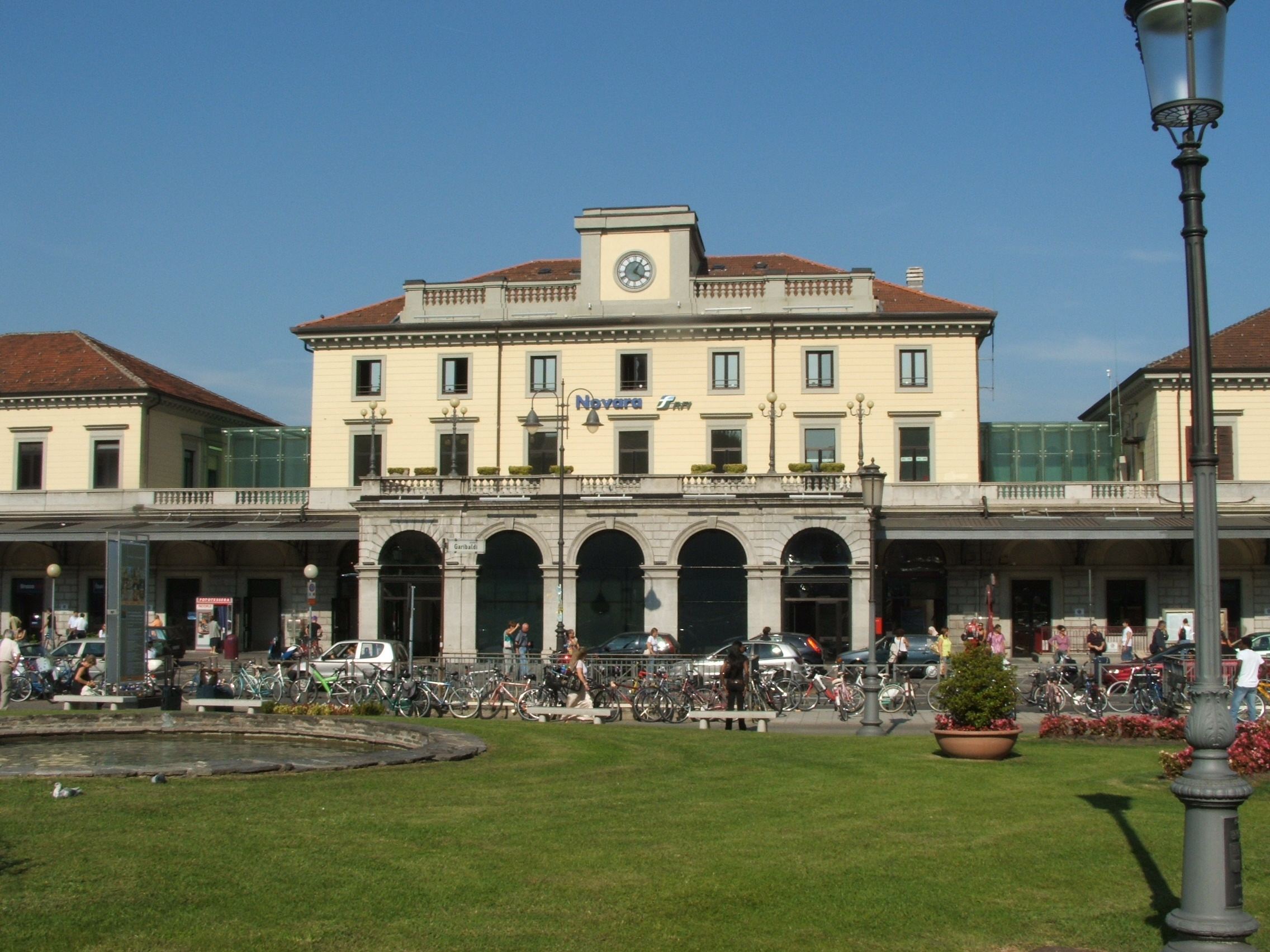 La stazione ferroviaria di Novara, Piemonte, Italia.